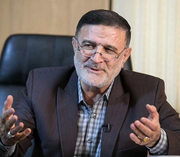 امیر دریادار سجاد کوچکی